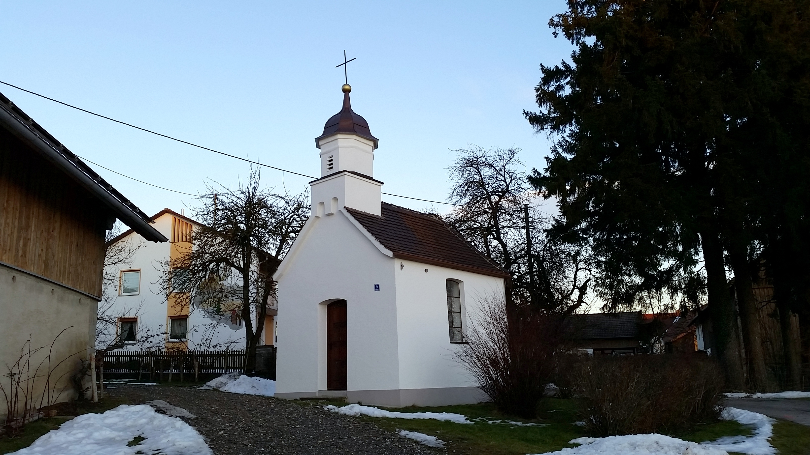 Kapelle St. Josef in Forsthofen, Gemeinde Ettringen (Wertach)